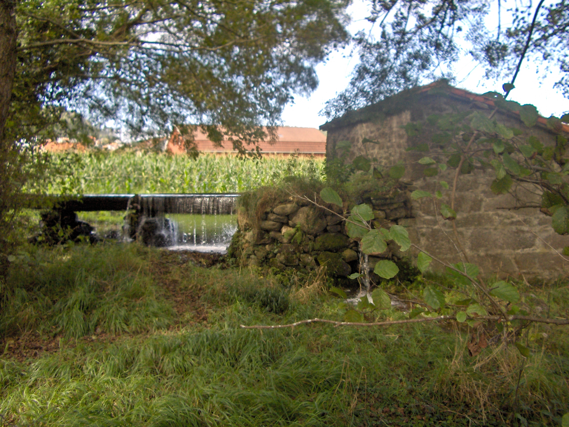 Muiño de Ferreiro (Rego dos Muiños)